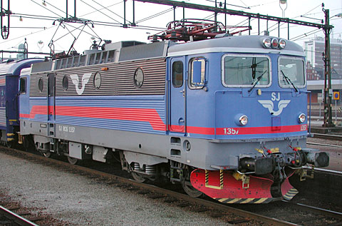 Rc-lok i Malmö